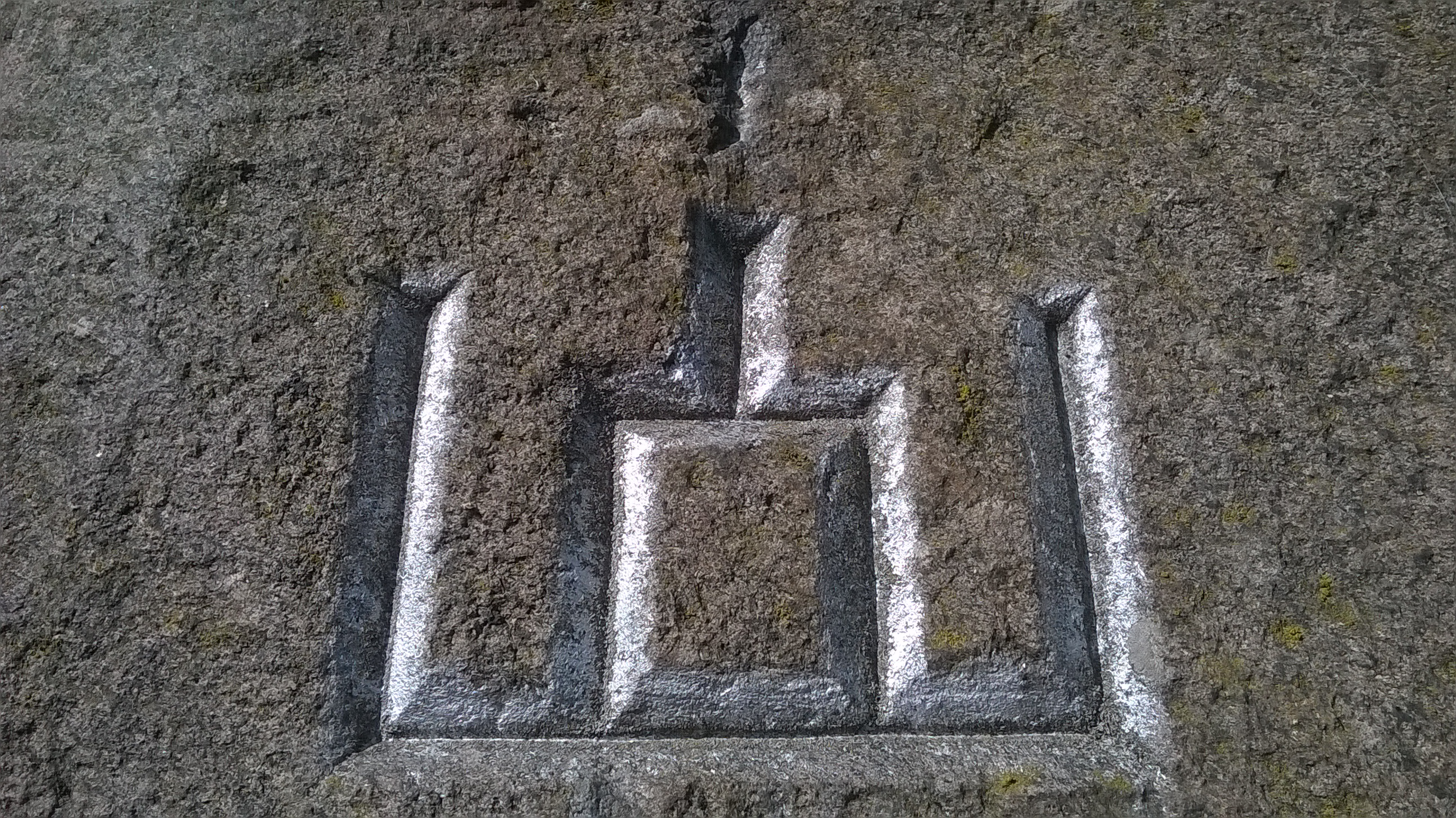 Pomnik poświęcony pamięci "nosiciela książek" Pawła Matulewicz.